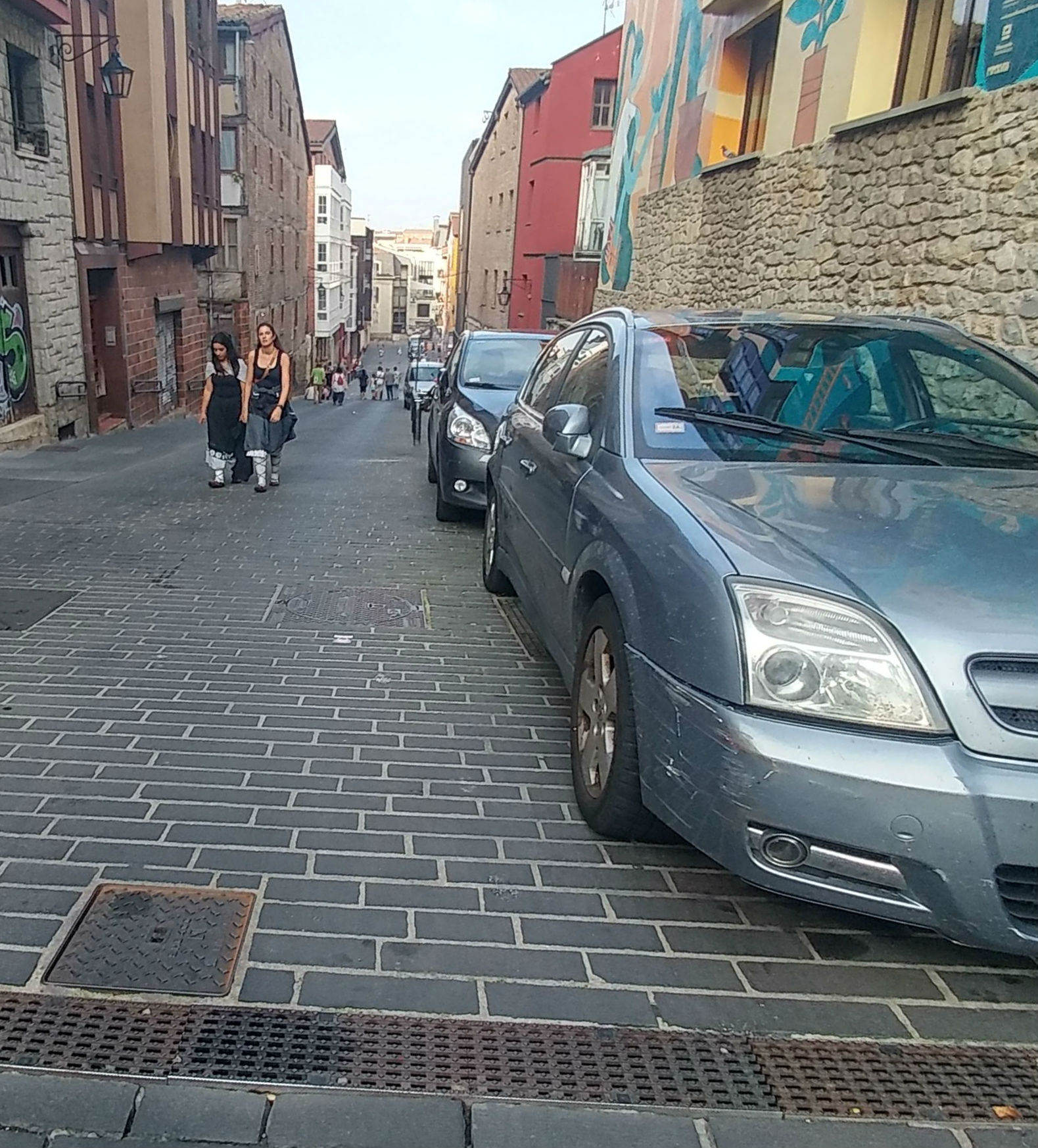 Gasteizko Santa Ana kantoia